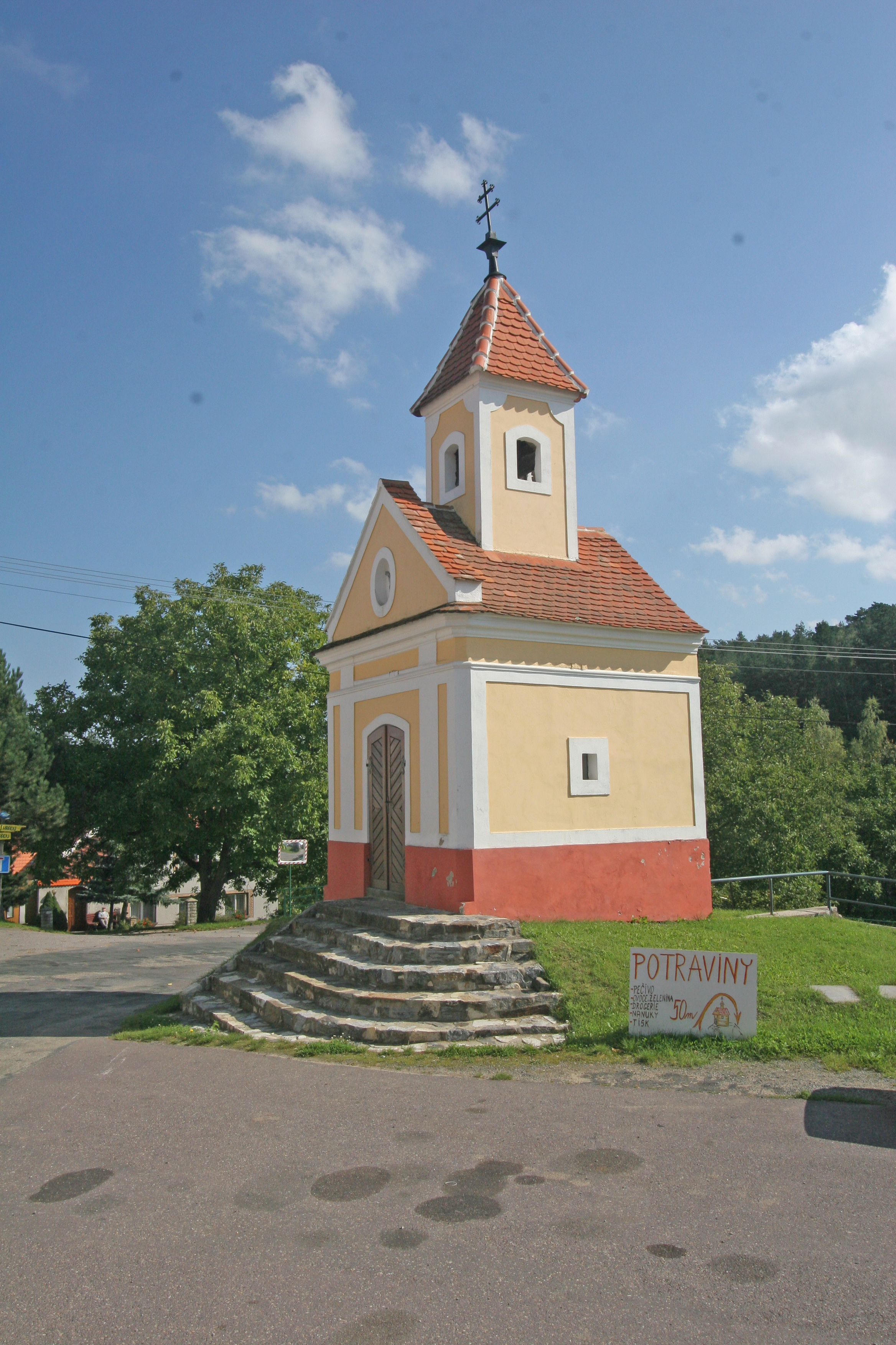 Vysočany kaple